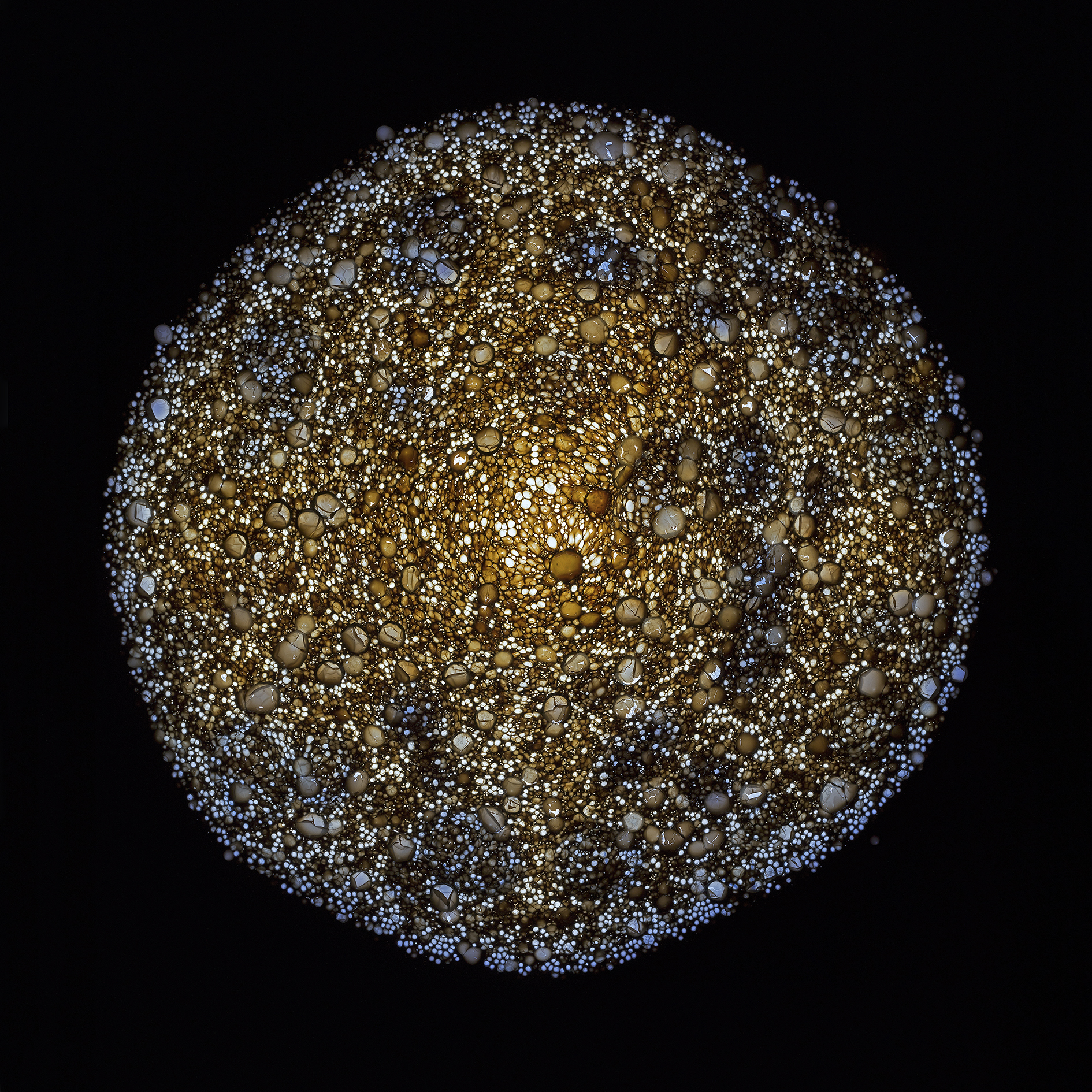 Heliografie, 2015, Originalfilm und div. Auflagenformate und Editionen, bis 120 x 120 cm